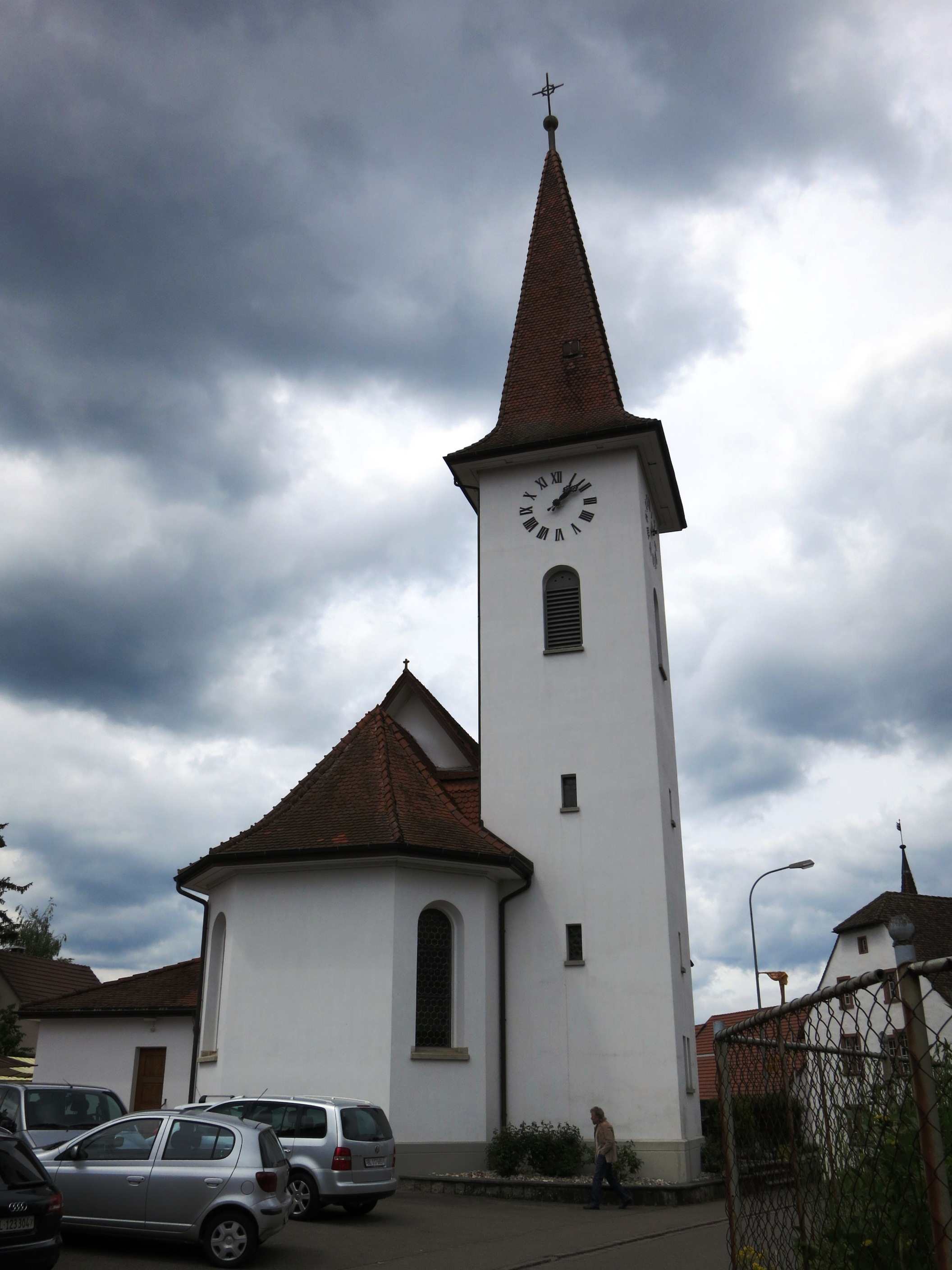 Kirche Oeschgen AG, Schweiz